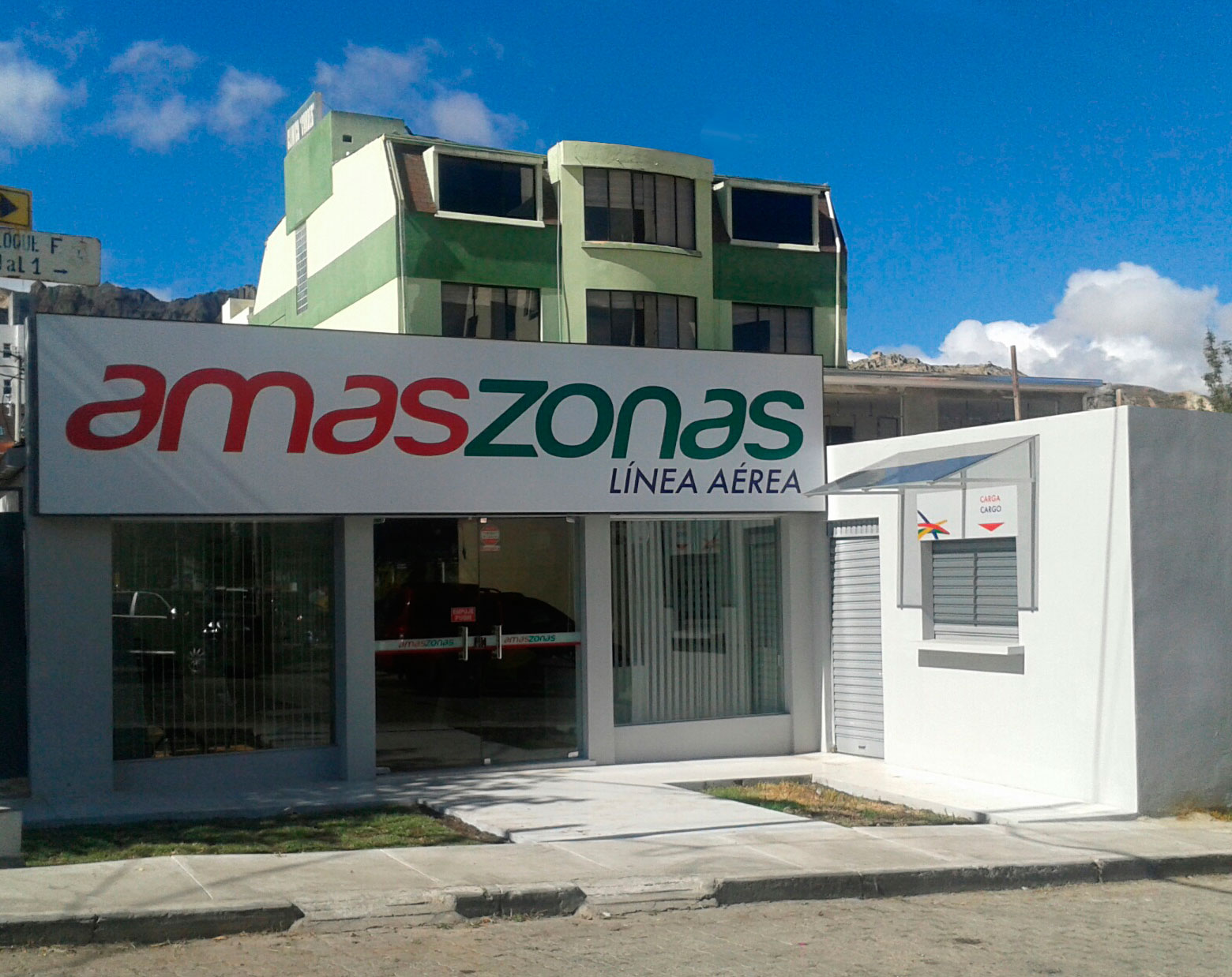 Amaszonas